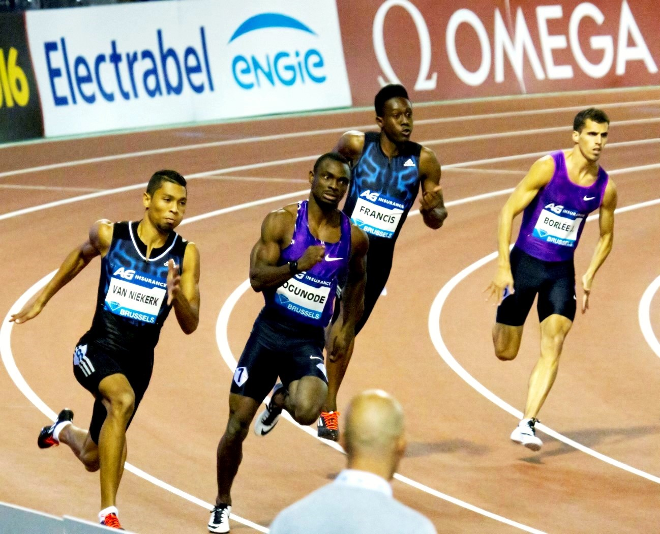 Men 200 m during Memorial Van Damme 2015, Brussels : Wayde van Niekerk, Femi Ogunode, Miguel Francis and Jonathan Borlée